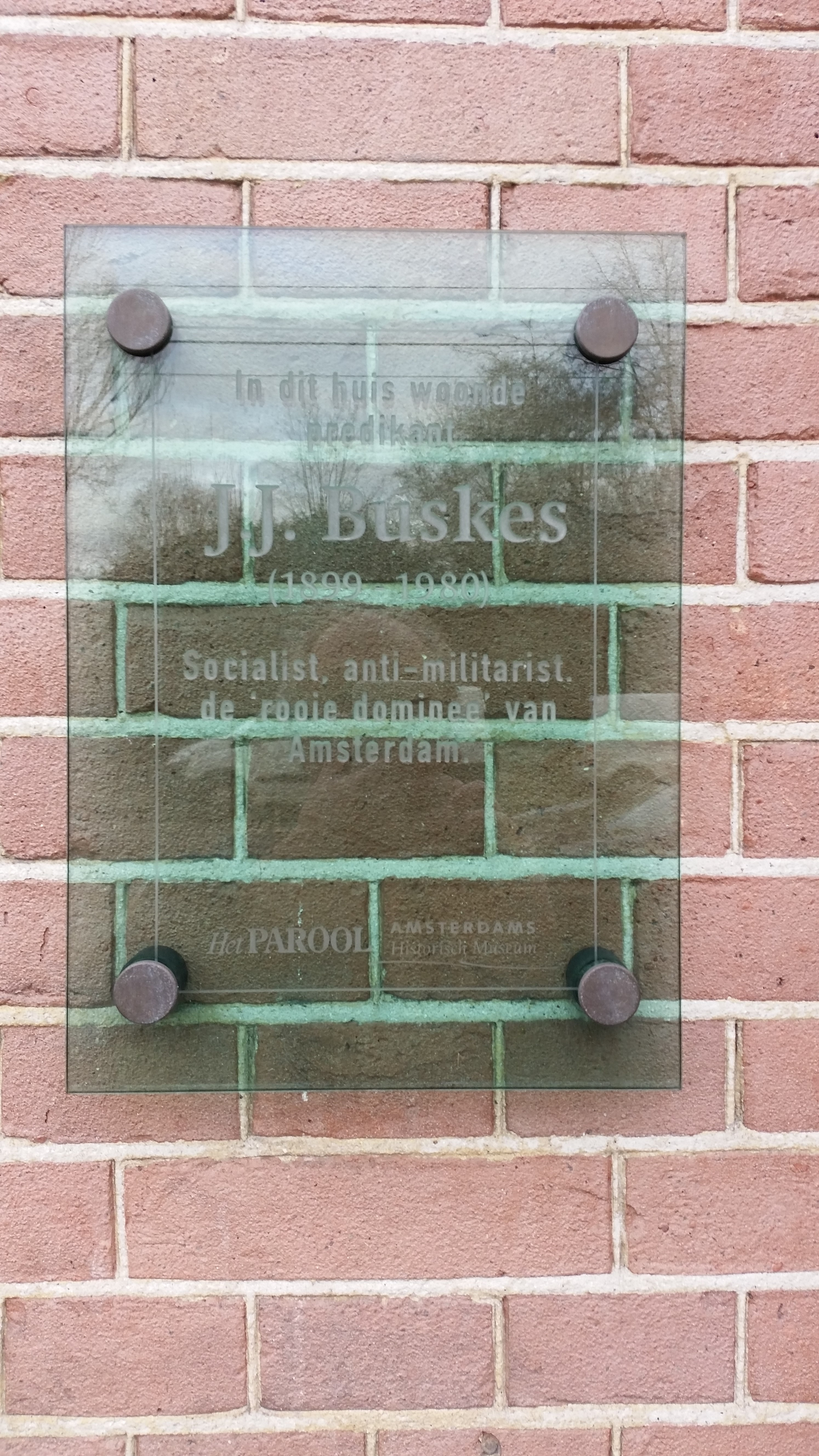 Impressie van de Oosterpark als straat in Amsterdam-Oost. (februari 2020) met plaquette Jan Busksr